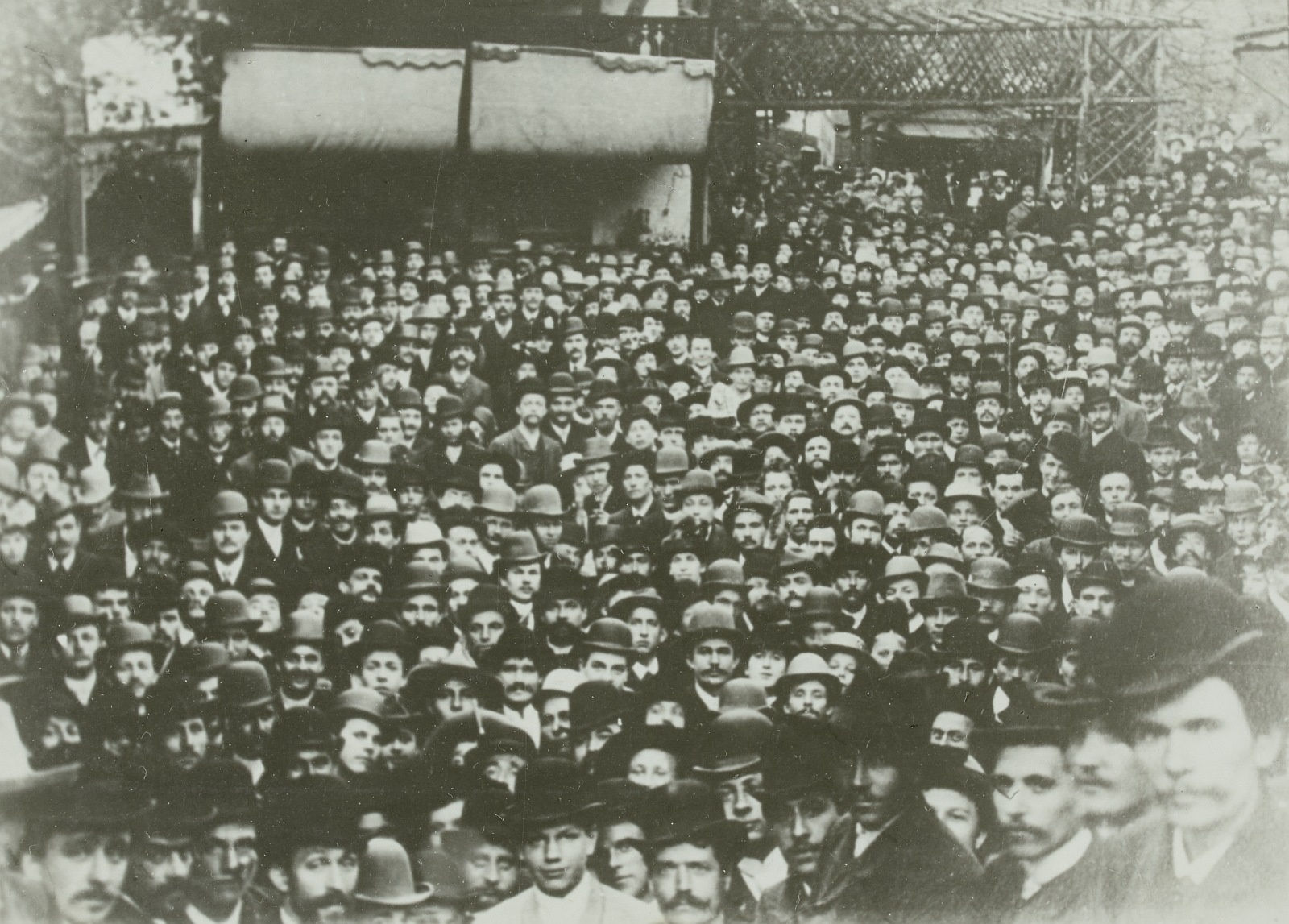 Maifeier 1890 im Garten der Gaststätte 'Schweizerei' in Dresden-Loschwitz Reproduktion: Roland Handrick, Nov. 1963